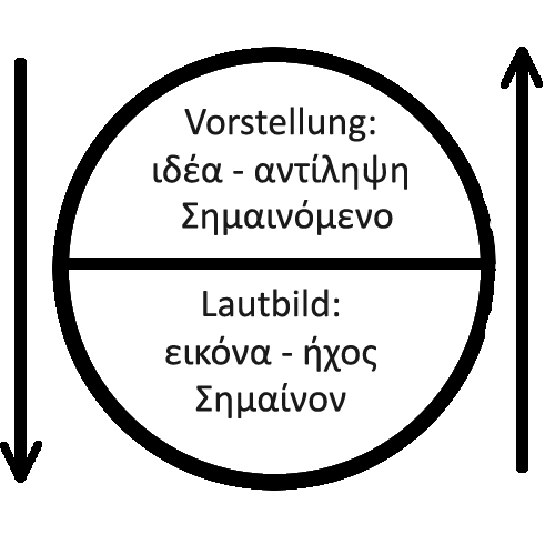 Σημαίνον και σημαινόμενο / Θεωρία Γλωσσολογίας.